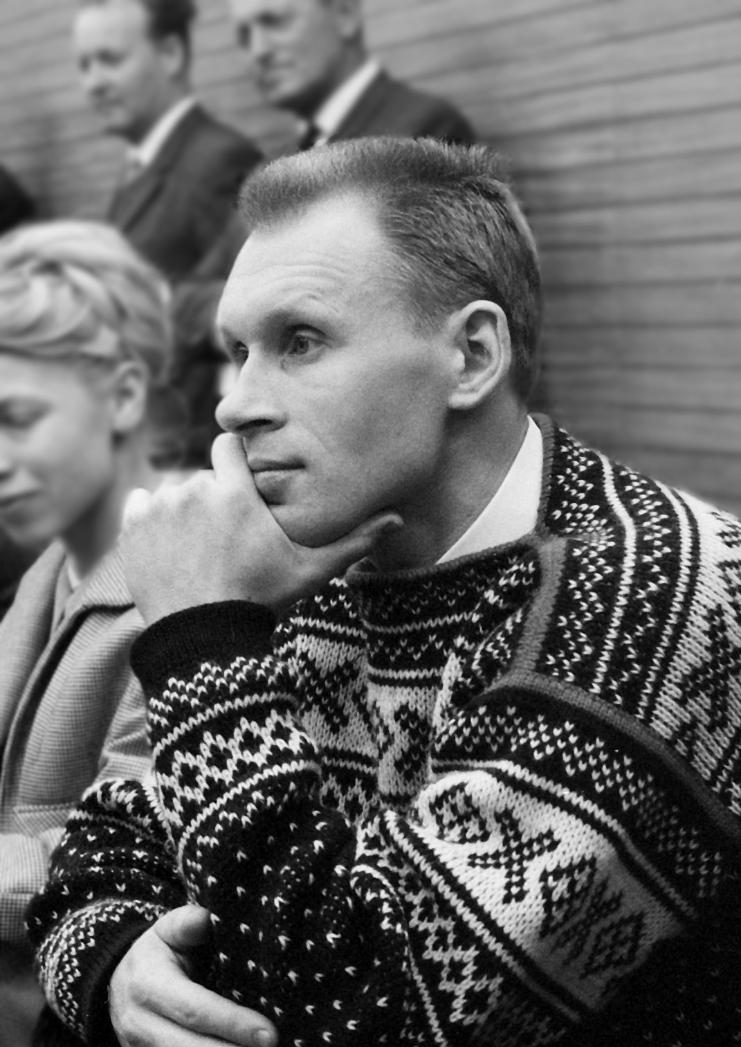 Oleg Protopopov at Schiphol